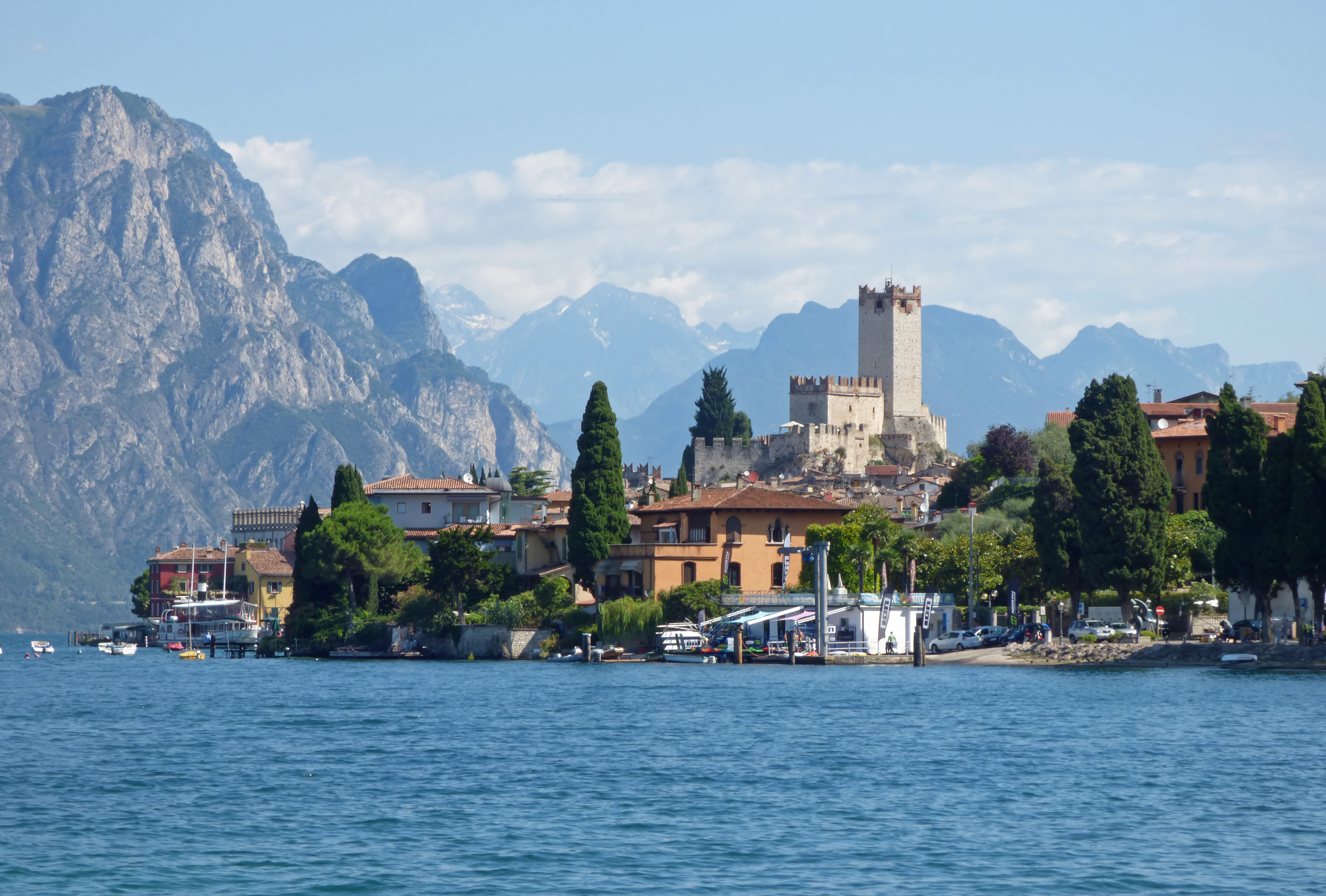 Malcesine 5